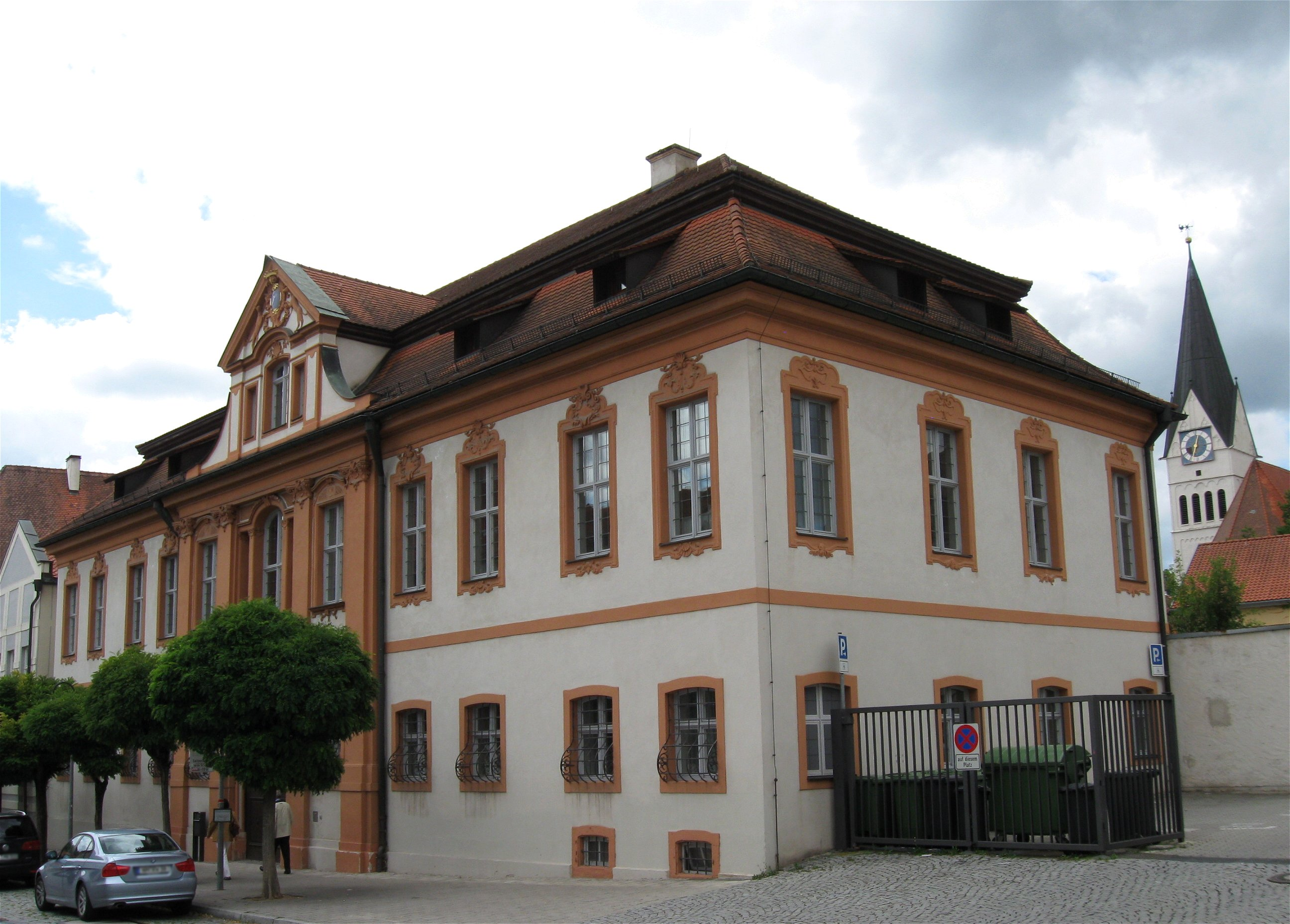 Luitpoldstraße 1; ehemaliger Ostein-Riedheim-Hof Rokokopalais mit Mansardwalmdach, Mittelrisalit und stuckierten Fassaden, erbaut von Gabriel de Gabrieli, um 1730; Umbau 1992-94 zum Diözesanarchiv durch Karljosef Schattner. D-1-76-123-104